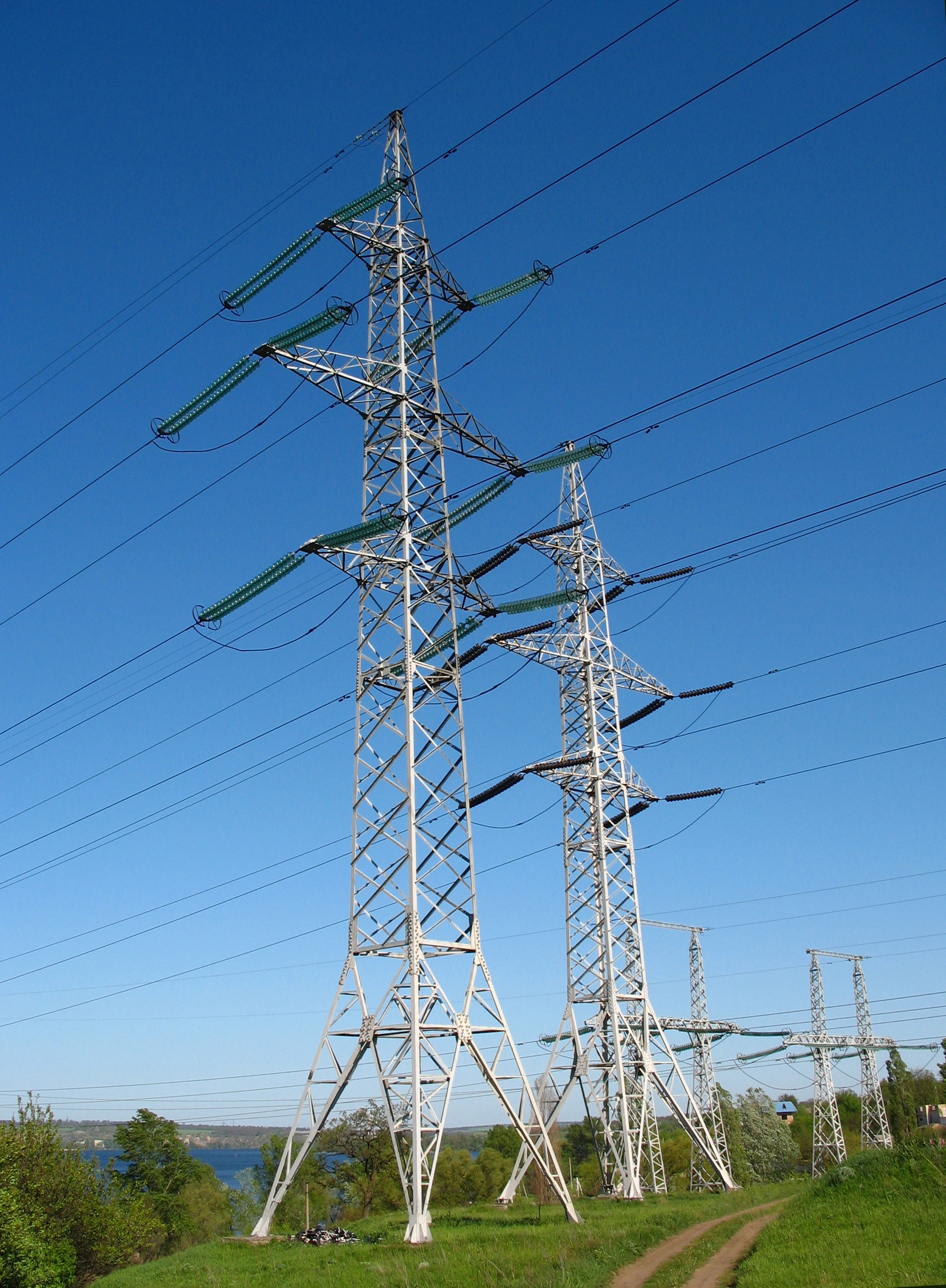 Опоры ЛЭП в Лоц-Каменке, город Днепр. Слева направо: 330 кВ, 150 кВ, 330 кВ.